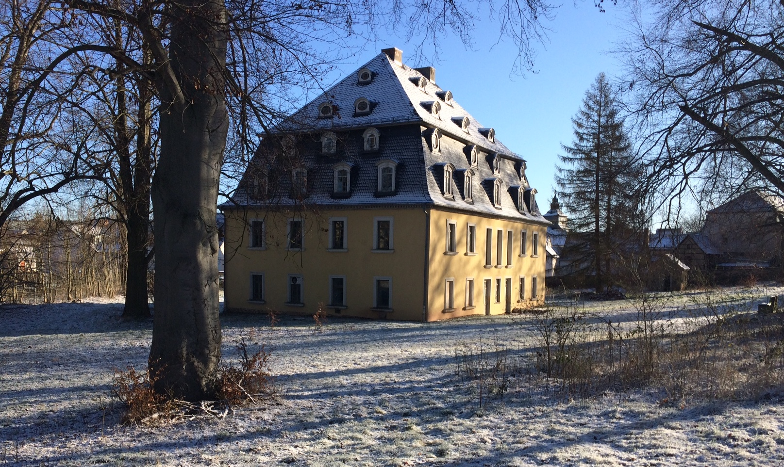 Schloss Burkersdorf von Südwesten